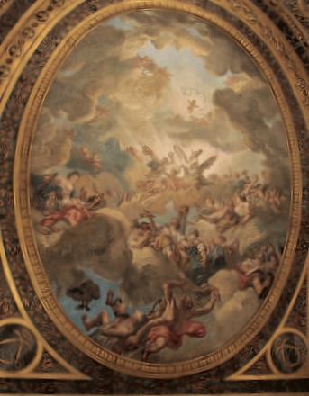 "Apollon préparant les couronnes aux homme illustres dans les arts," plafond de l'Opéra royal de Versailles